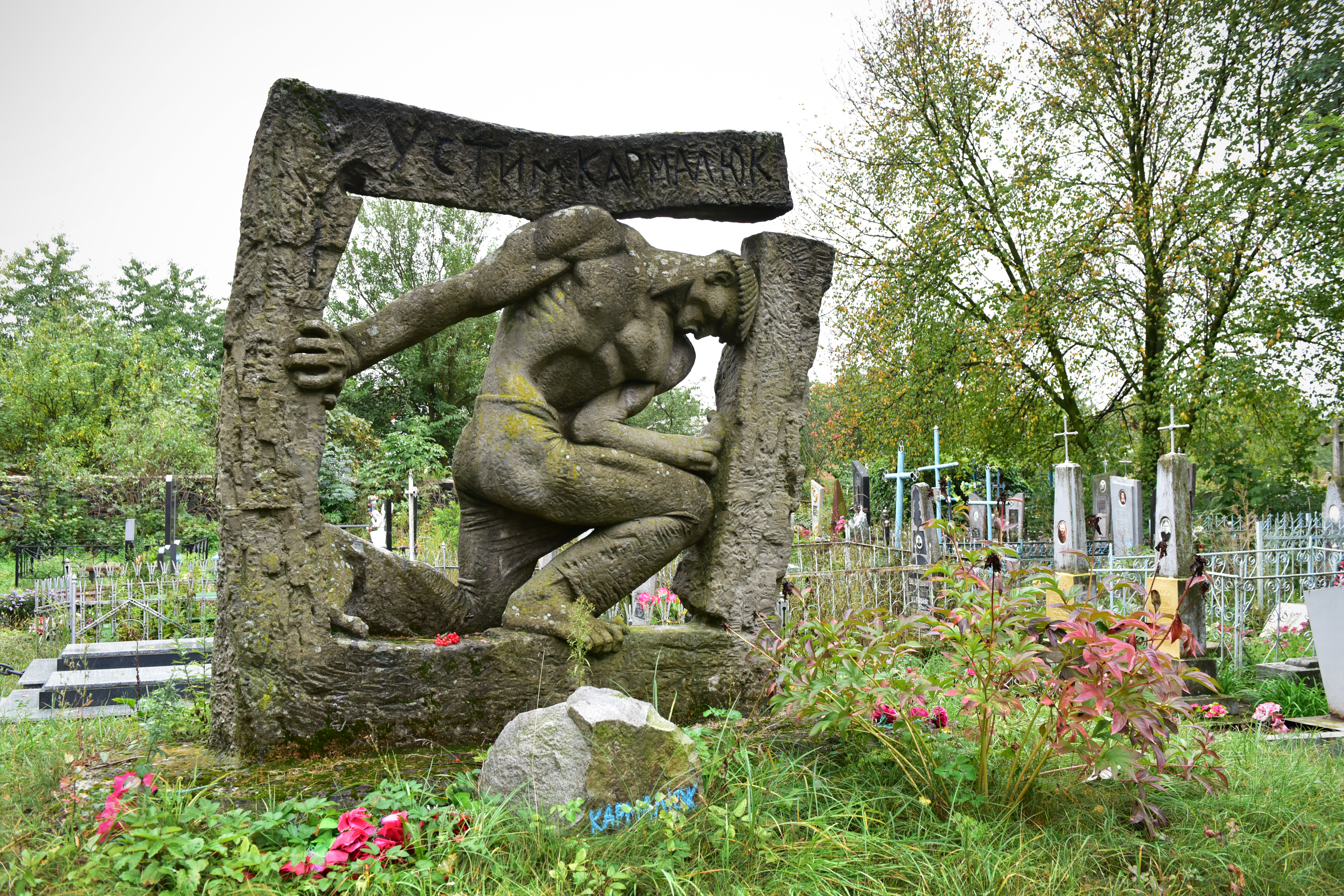 Могила керівника селянського руху на Поділлі Устима Кармалюка, смт Летичів, вул. Горького, 1, кладовище